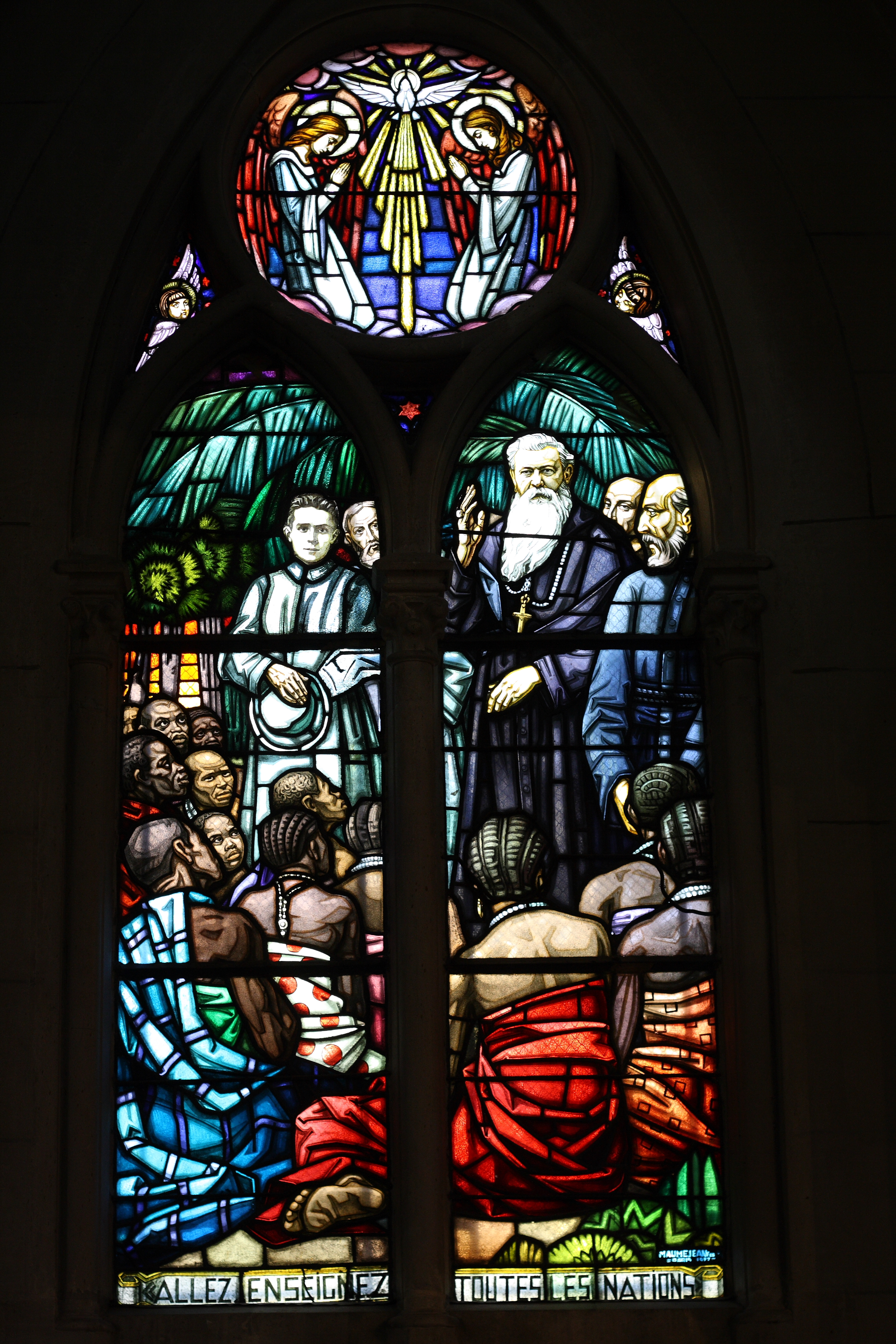 Bleiglasfenster in der Kapelle Sainte-Thérèse in Paris (40, rue La Fontaine, 16. Arrondissement), Darstellung: rechts unten Signatur: "MAUMEJEAN Fes Paris 1927" (siehe Glasmalerei Mauméjean)